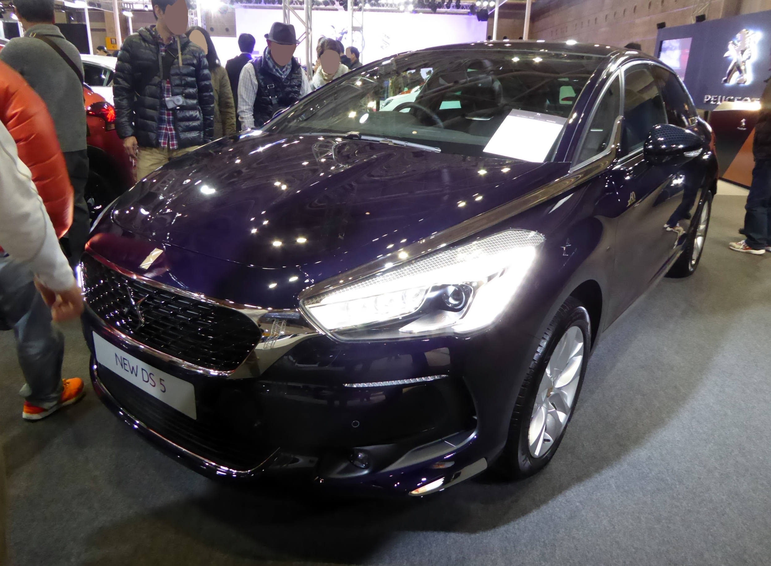 大阪モーターショー2015においてDS 5 エディション1955を撮影。